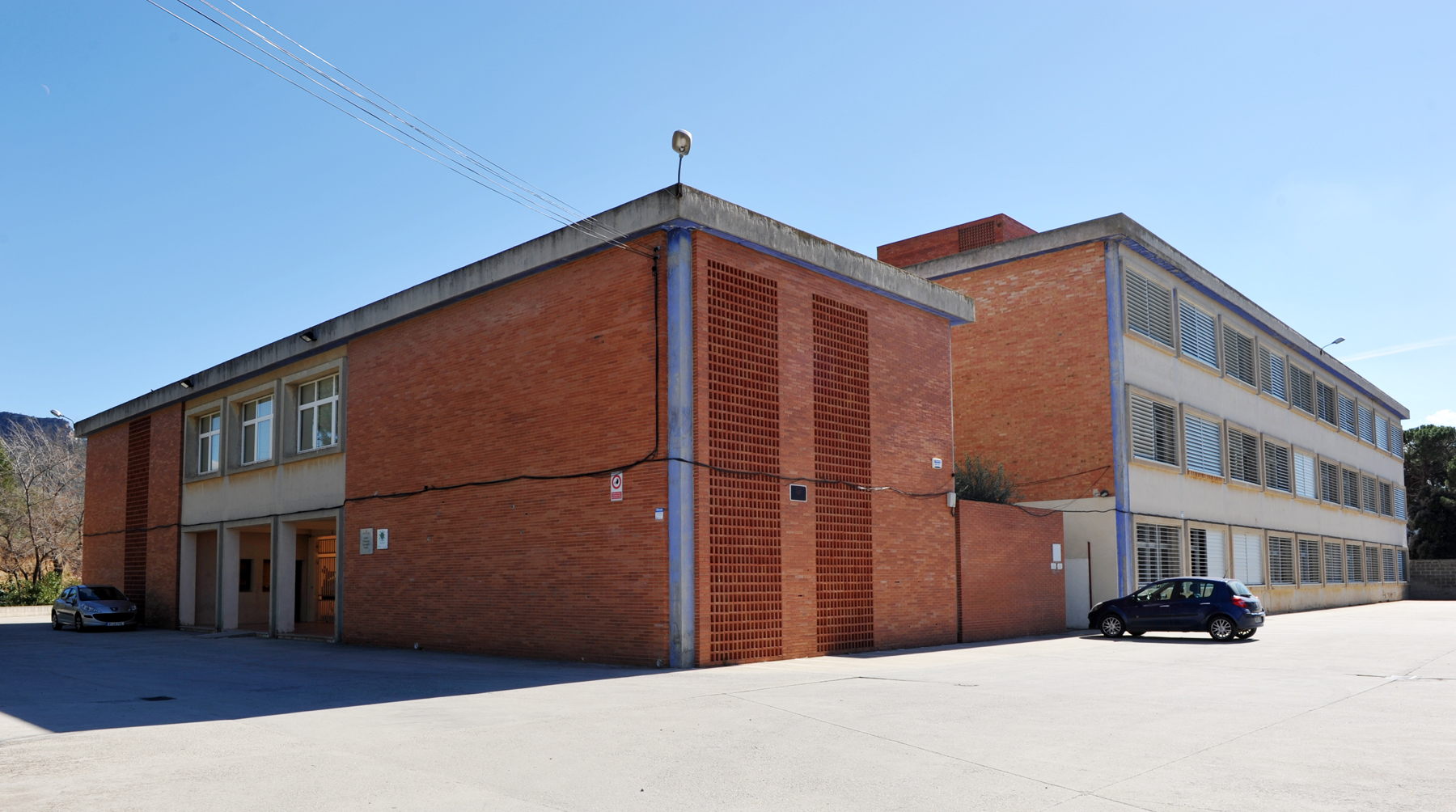 Vista de l'entrada